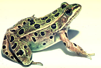 Rana pipiens